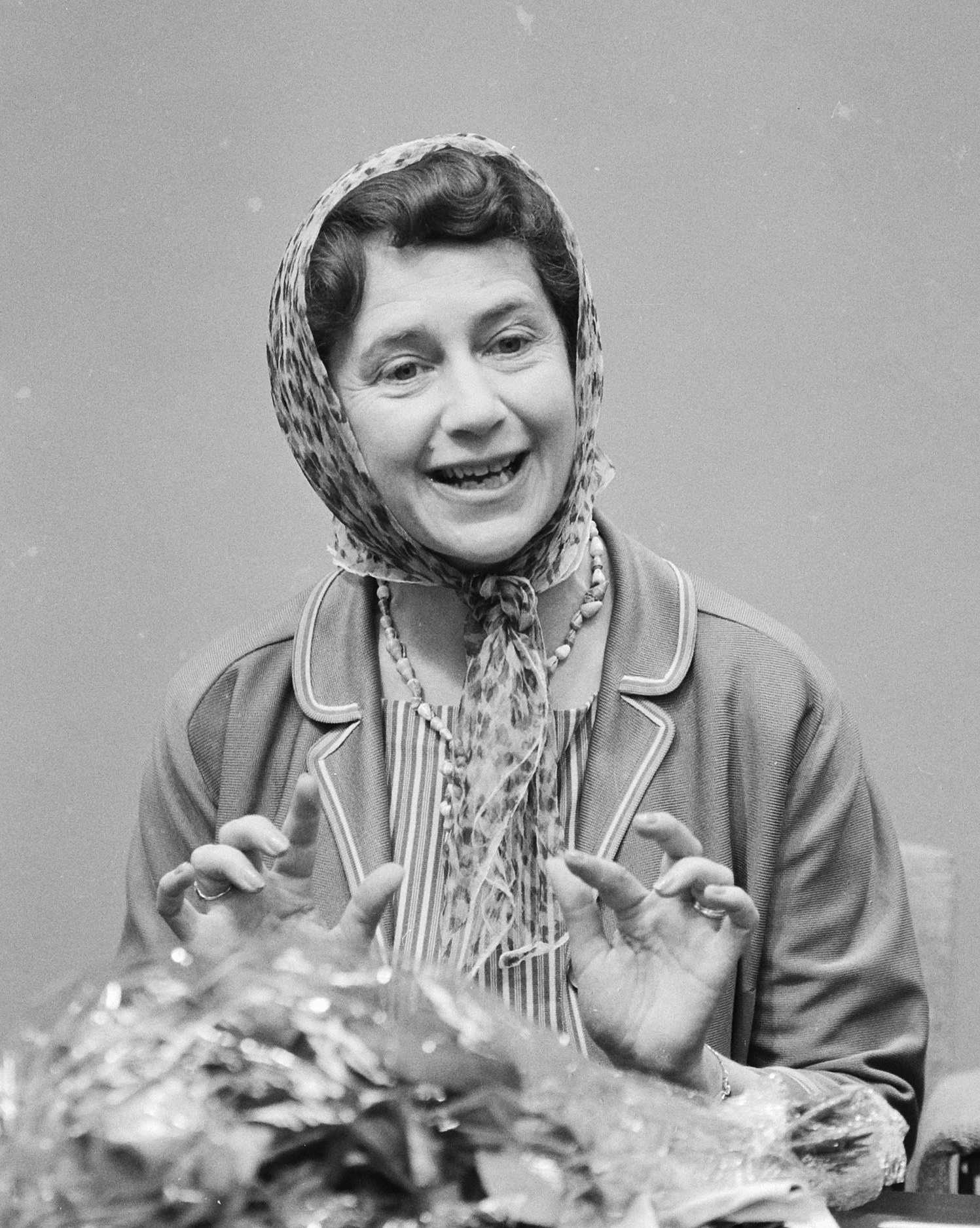 Actrice Peggy Ashcroft op Schiphol voor optreden in Stadsschouwburg